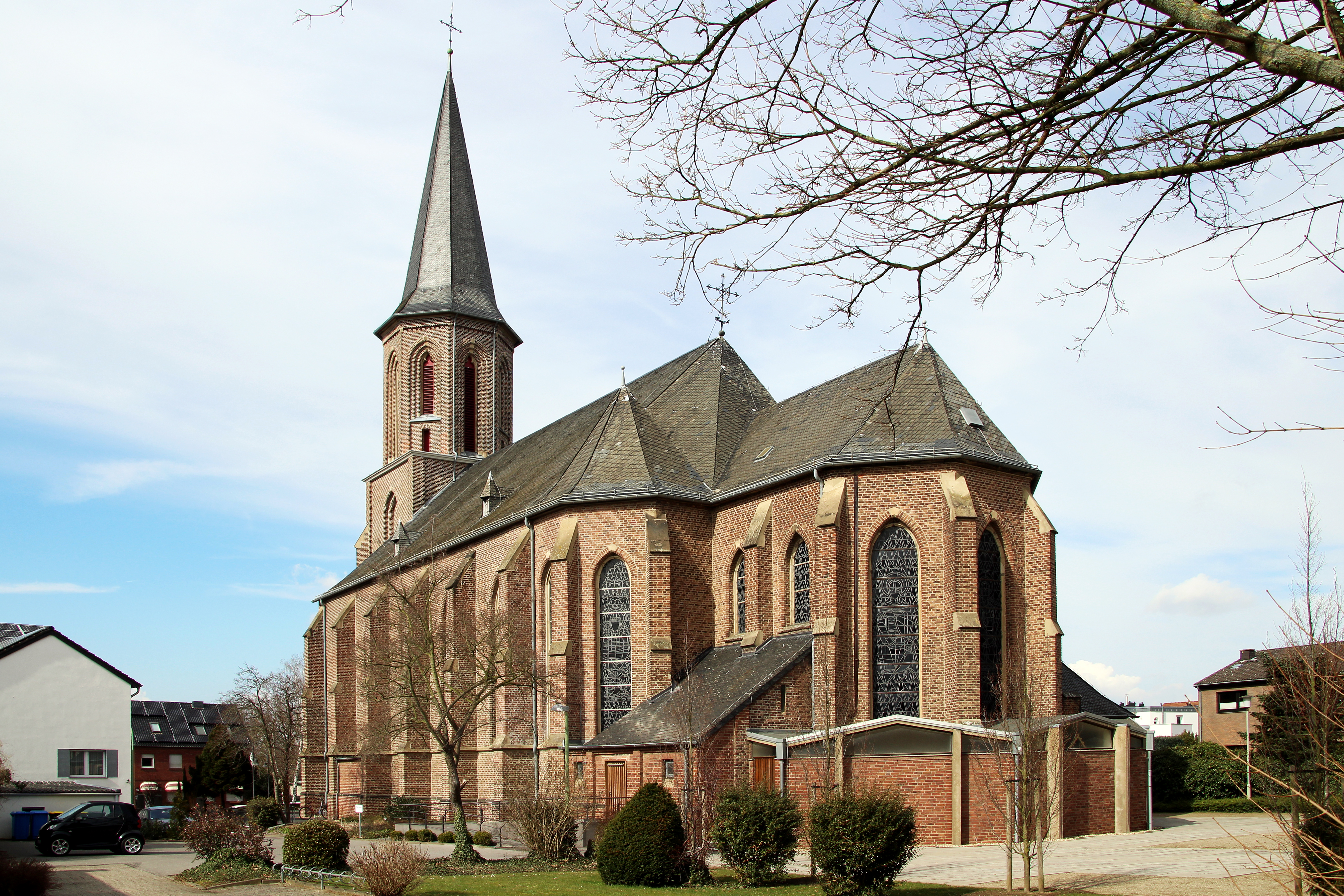 Südost-Ansicht der Kath. Pfarrkirche St. Johannes Evangelist in Gürzenich.